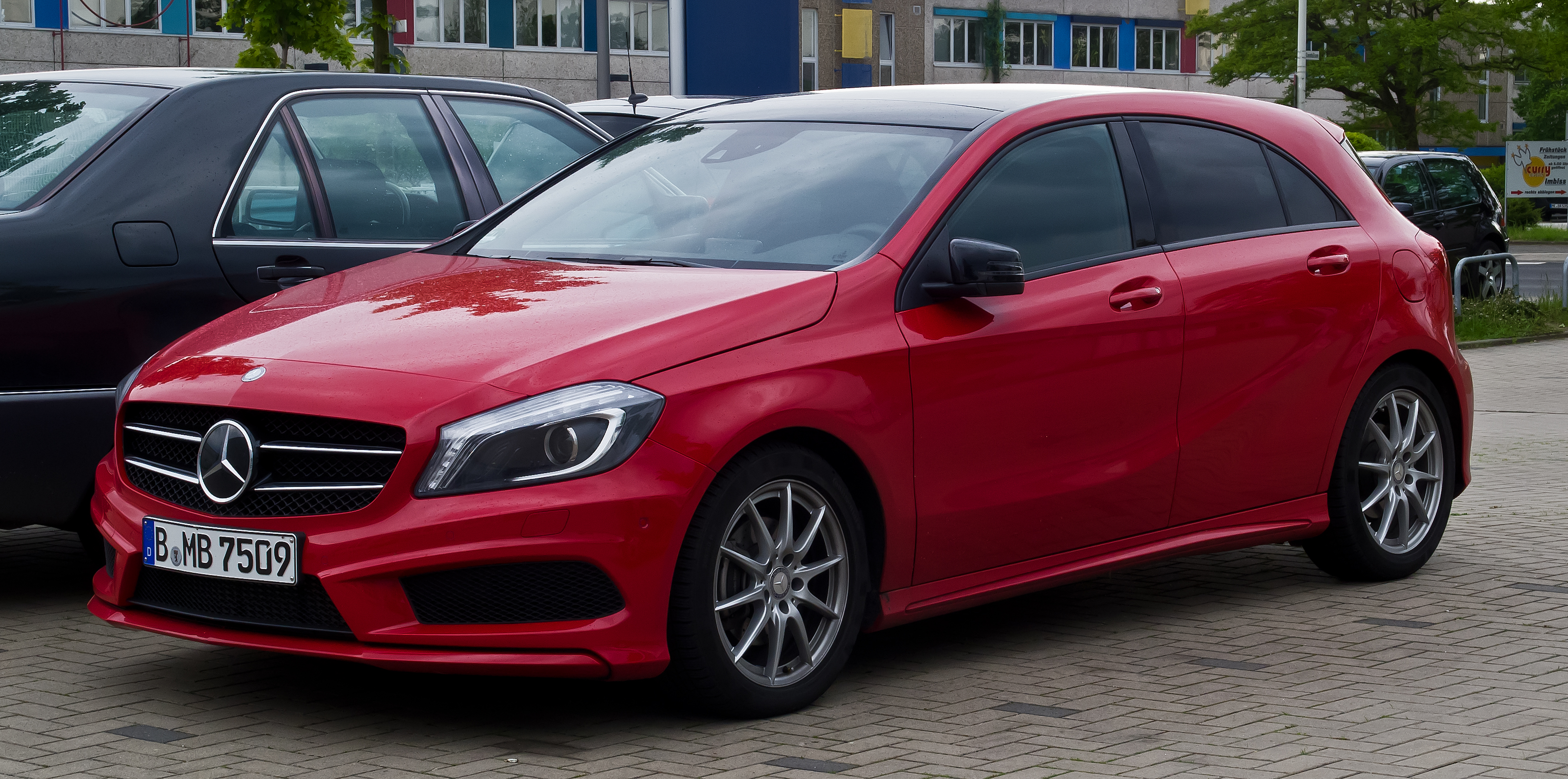 Mercedes-Benz A 200 AMG Line (W 176)